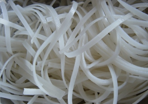 Kuai tiao sen lek เส้นเล็ก nouilles de riz thailand